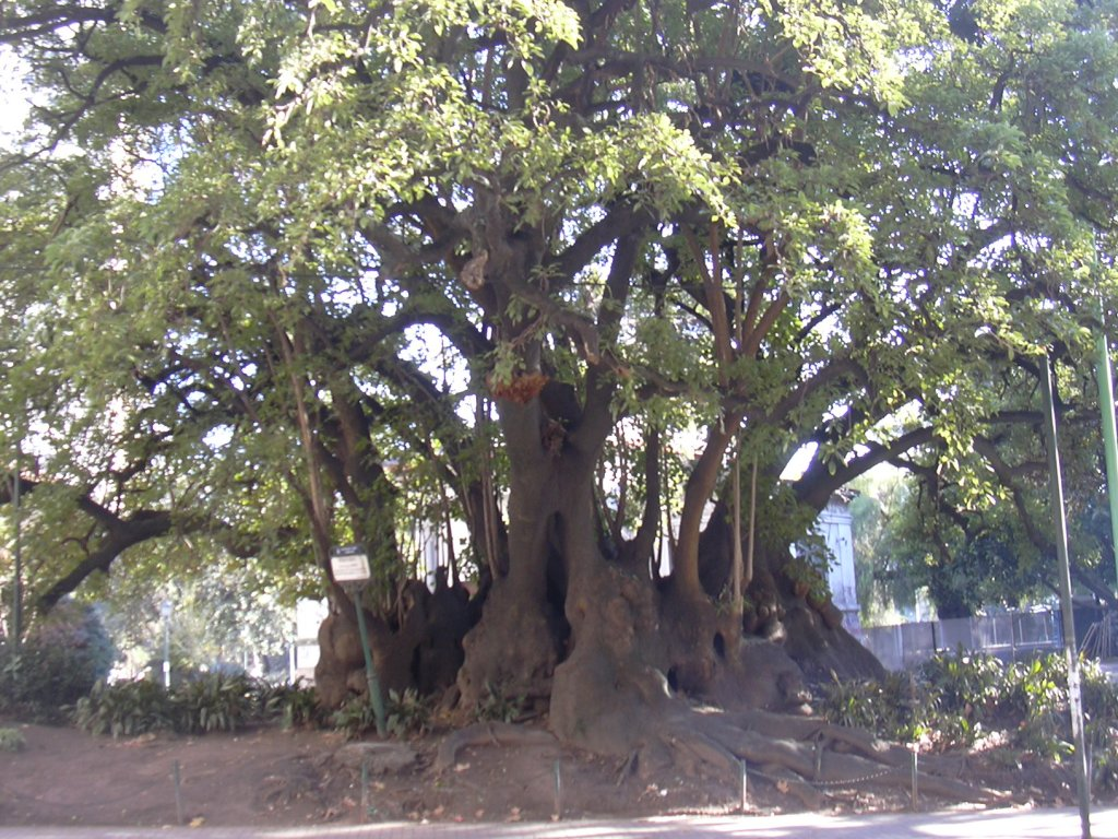 Fotografía de un Phytolacca dioica (Ombú) de la plaza Barrancas de Belgrano, en el barrio Belgrano de Buenos Aires./Picture of a Phytolacca dioica from the Barrancas de Belgrano park in the barrio Belgrano in Buenos Aires.